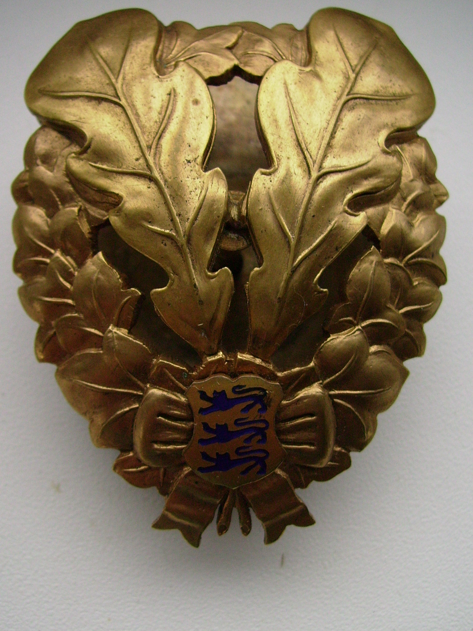 Looduskaitsemärk, 1. järk (1938. aasta variant)